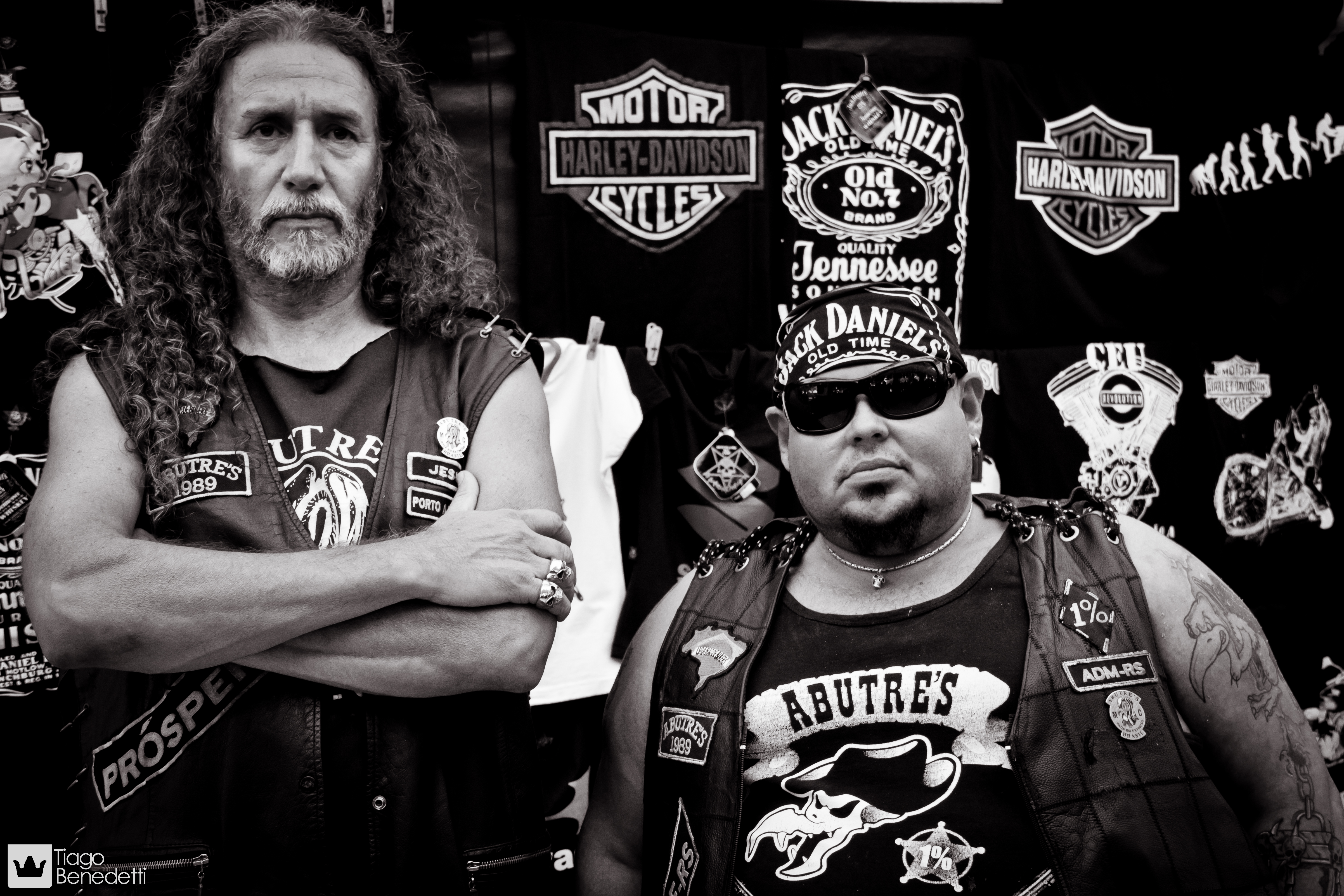 Zango Fest - Ijuí RS